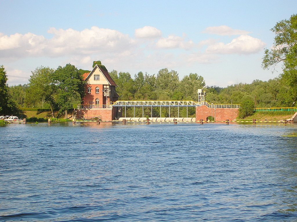 Jaz walcowy w Brdyujściu w Bydgoszczy